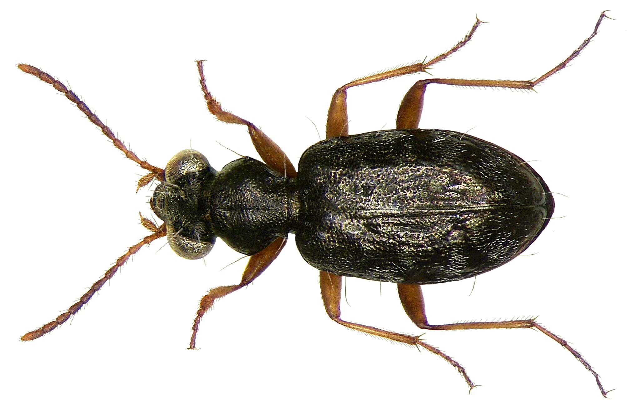 Familie: Carabidae Größe: 4,0-4,8 mm Verbreitung: Europa ohne den hohen Norden und ohne Iberische Halbinsel Ökologie: bevorzugt offenes Gelände Fundort: Austria, Karawanken, Ferlach leg.det. U.Schmidt, 1982 Foto: U.Schmidt, 2008